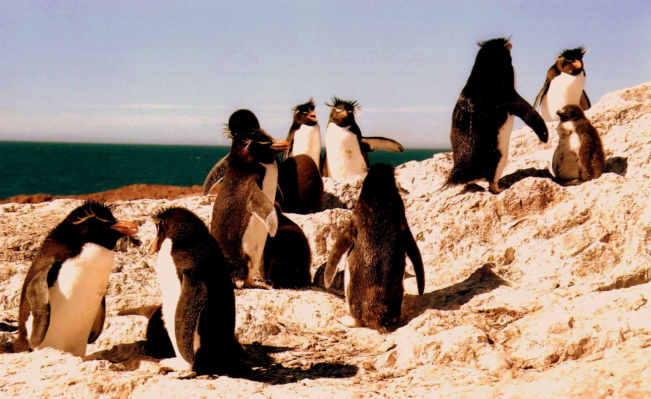 Isla Pingüino, Mar Argentino, Santa Cruz, Argentina